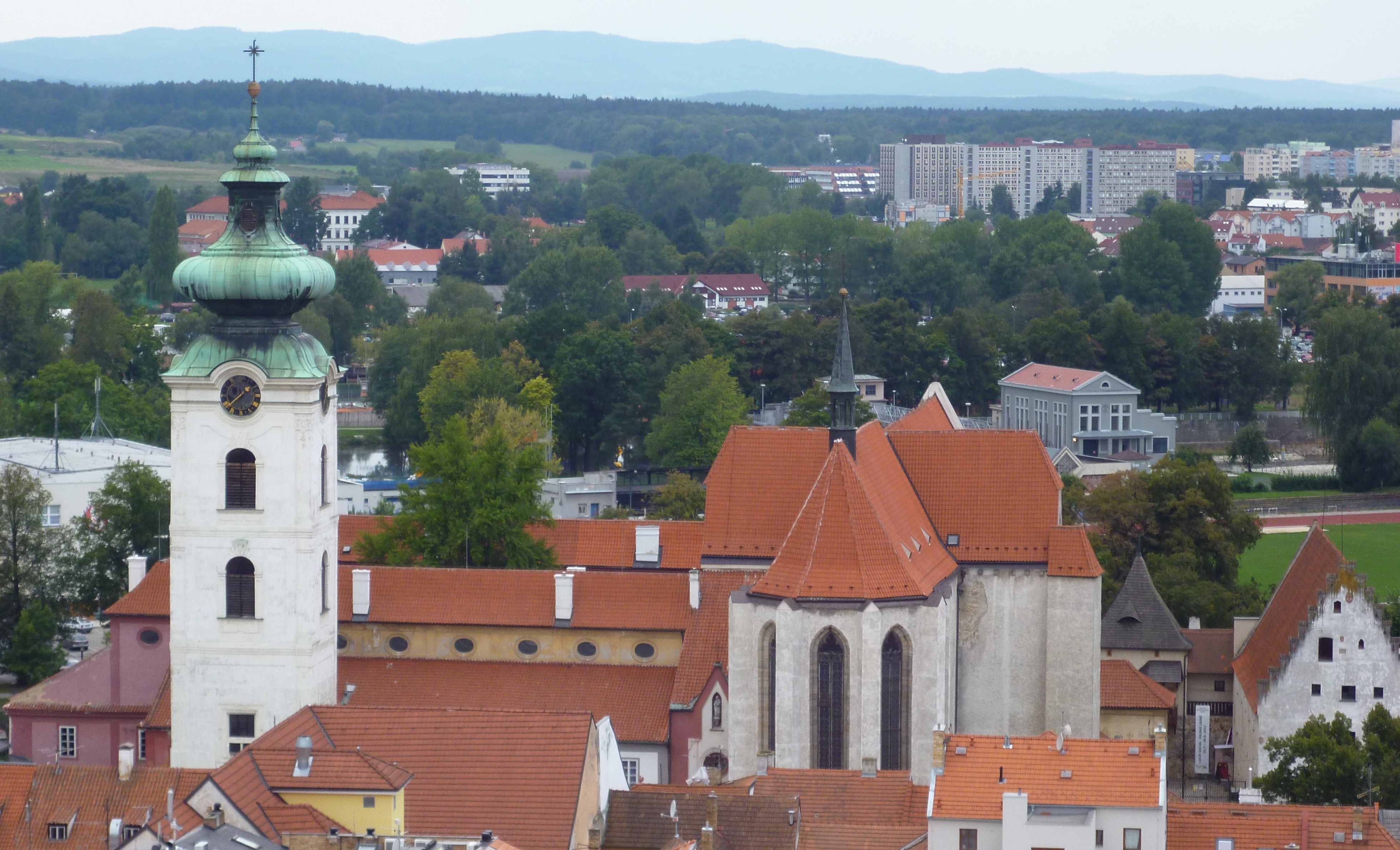 ČB, klášter sv. Dominika, s kostelem Obětování P. Marie, Piaristické nám. 149, vpravo solnice (z Černé veže)